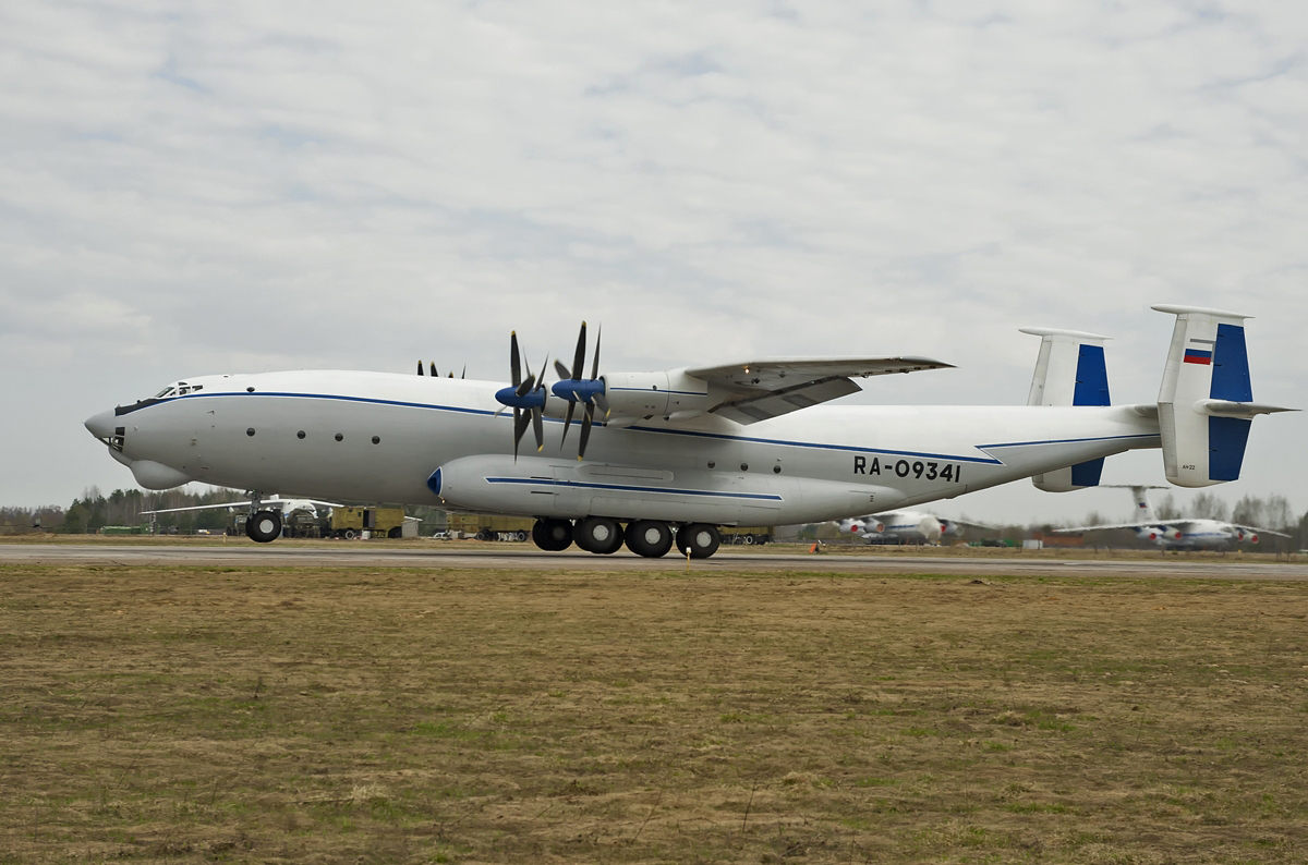 Lifting.AN-22 RA-09341